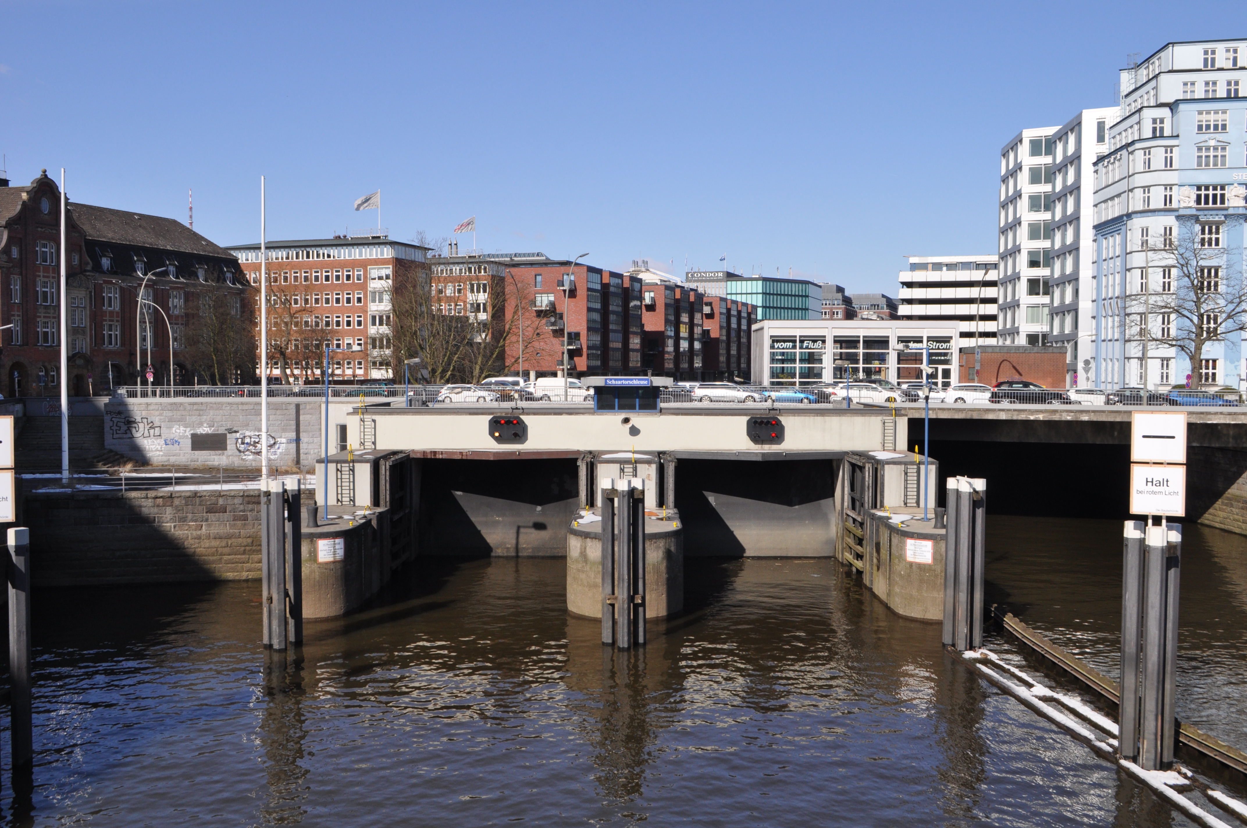 Schaartorschleuse in Hamburg. Diese trennt das Alsterfleet vom Binnenhafen.